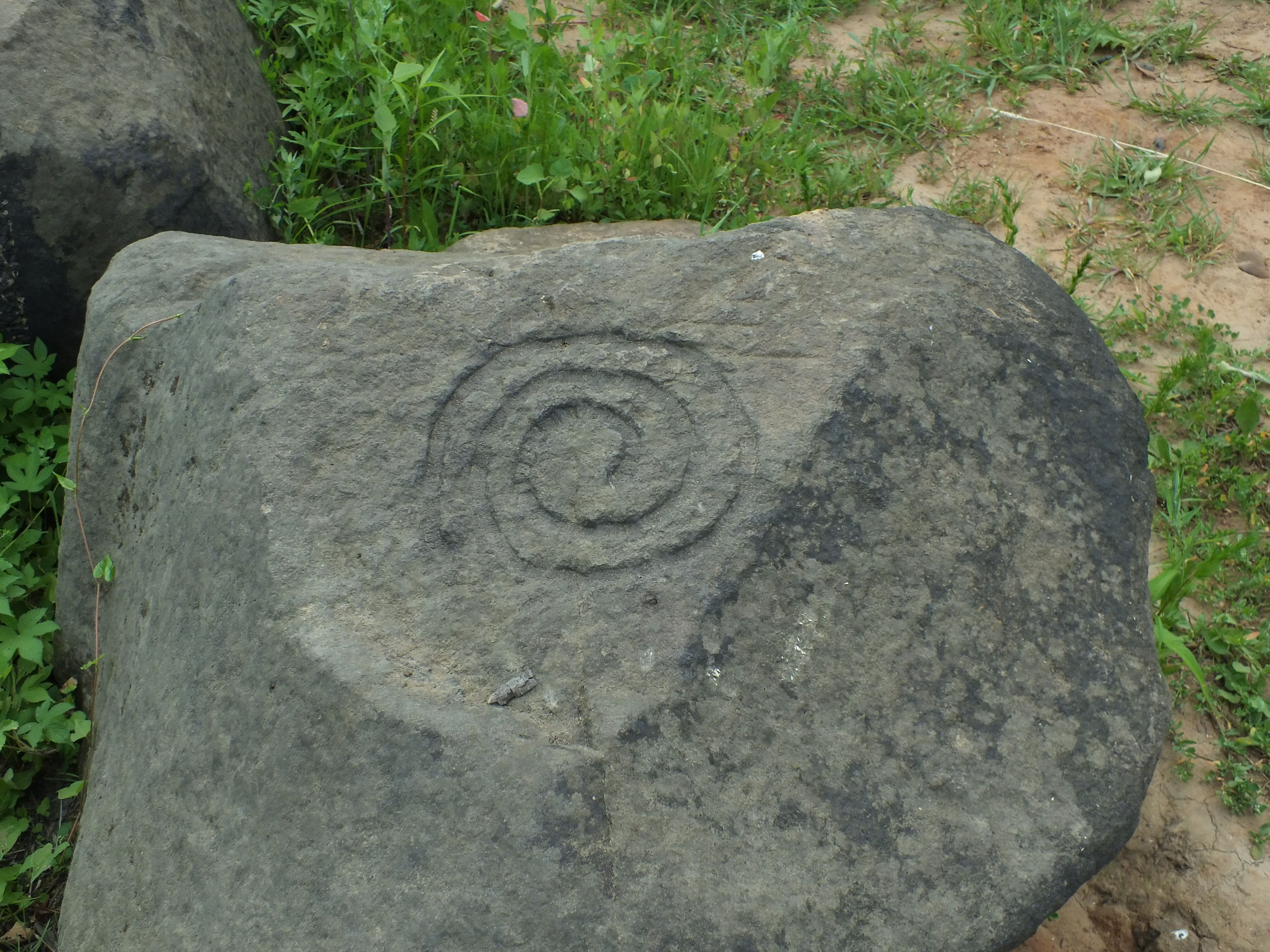 Petroglif of Sikachi-Alyan